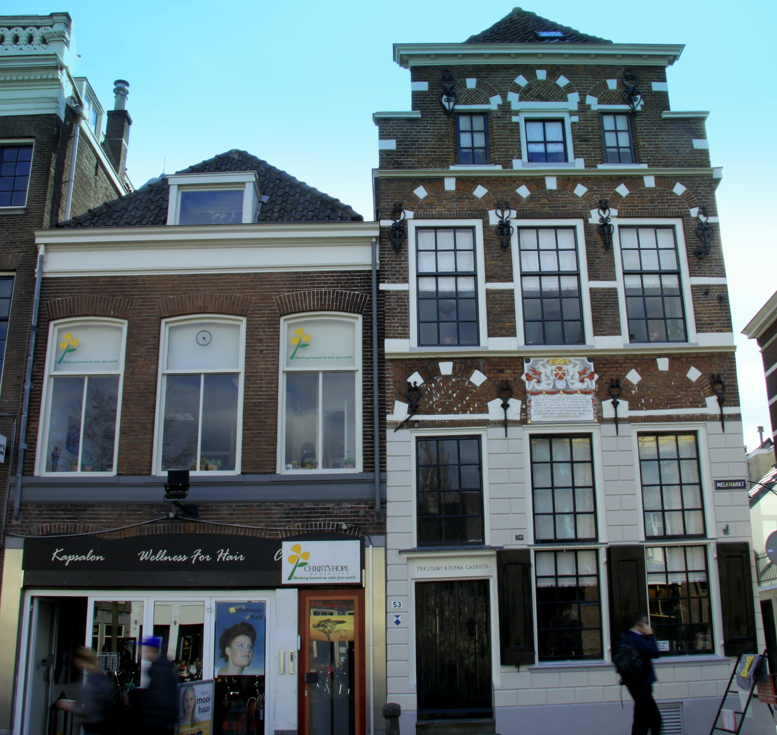 Aan de Melkmarkt. Het 16e Eeuwse Vrouwenhuis. Onder de Melkmarkt stroom nog altijd het riviertje de Grote Aa.